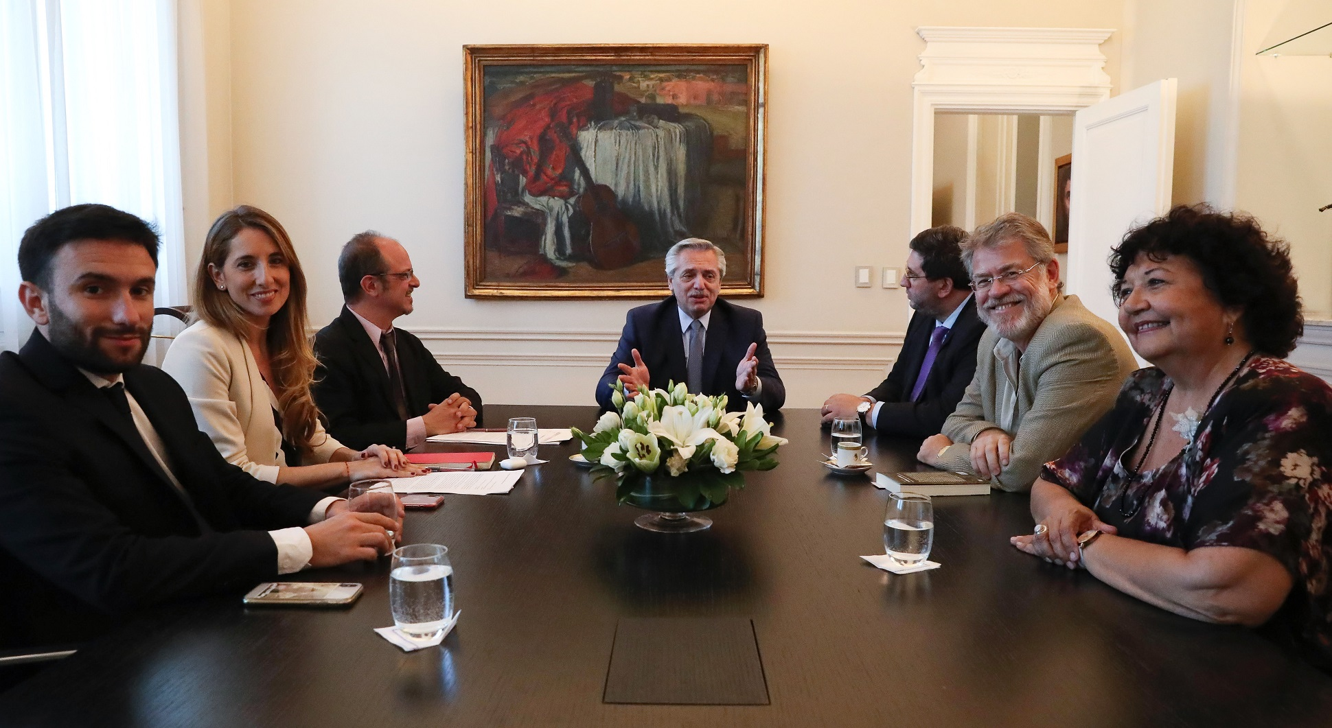 El presidente Alberto Fernández mantuvo esta tarde en Casa Rosada la primera reunión con su Consejo de Asesores, un equipo de profesionales y académicos que trabajarán para generar contenido político aportando una mirada sobre la sociedad y el estado de su gestión. Liderados por el jefe de Asesores, Juan Manuel Olmos, y su vicejefe Julián Leunda, los designados por el Presidente son la socióloga y referente feminista Dora Barrancos, el filósofo Ricardo Forster, el antropólogo Alejandro Grimson y la politóloga Cecilia Nicolini. En su primer encuentro, debatieron acerca de las grandes problemáticas que atraviesa la sociedad argentina, con el objetivo de proponer espacios de encuentro y diálogo, con amplitud de miradas para superar la crisis en la que se encuentra el país. Entre los temas tratados, se discutió sobre proyectos para ampliar derechos a mujeres y jóvenes, retomar la cultura como un eje fundamental de la convivencia y el sentido de comunidad, y la posibilidad de lanzar un gran debate nacional para abrir espacios de diálogo con toda la ciudadanía sobre lo que nos identifica. Una clara apuesta por el pensamiento y la idea de que solo logrando una sociedad más justa podremos poner de nuevo a la Argentina de pie en unidad. - Juan Manuel Olmos, abogado, jefe de asesores presidencial. - Julián Leunda, abogado, vicejefe de asesores presidencial. - Dora Barrancos, investigadora, socióloga e historiadora. - Cecilia Nicolini, politóloga, investigadora de la Universidad de Harvard y el MIT. - Alejandro Grimson, antropólogo, investigador y escritor. - Ricardo Forster, filósofo, profesor y escritor.